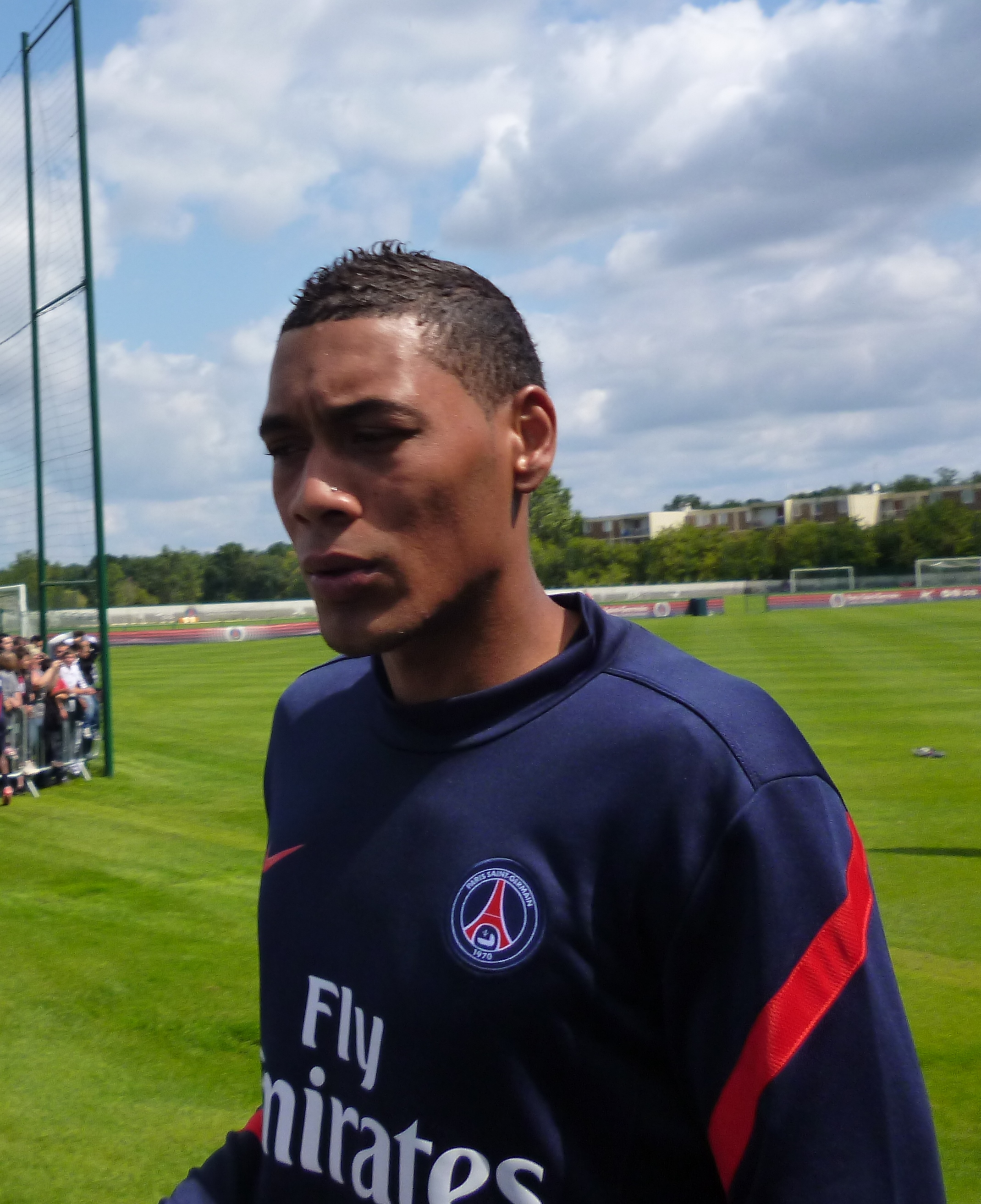 Guillaume Hoarau au Camp des Loges le 24 juillet 2011. Photo Vincent Hanquet pour